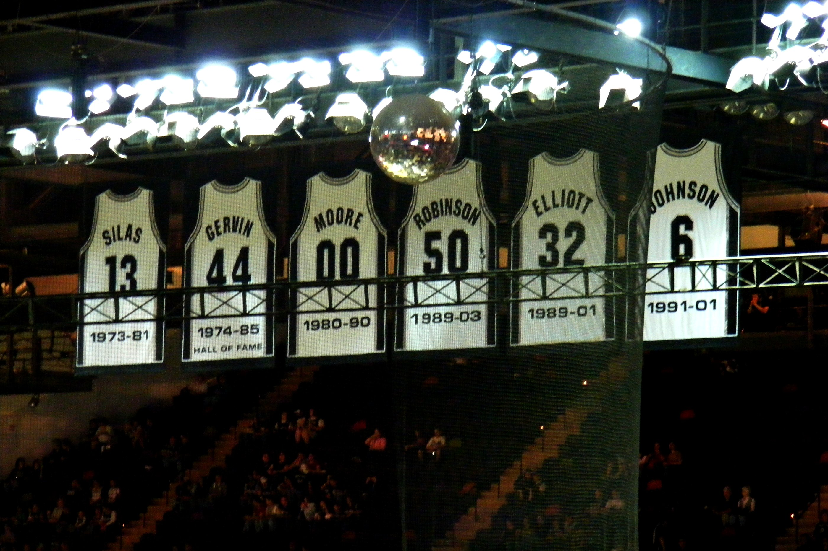 spurs vs. mavericks